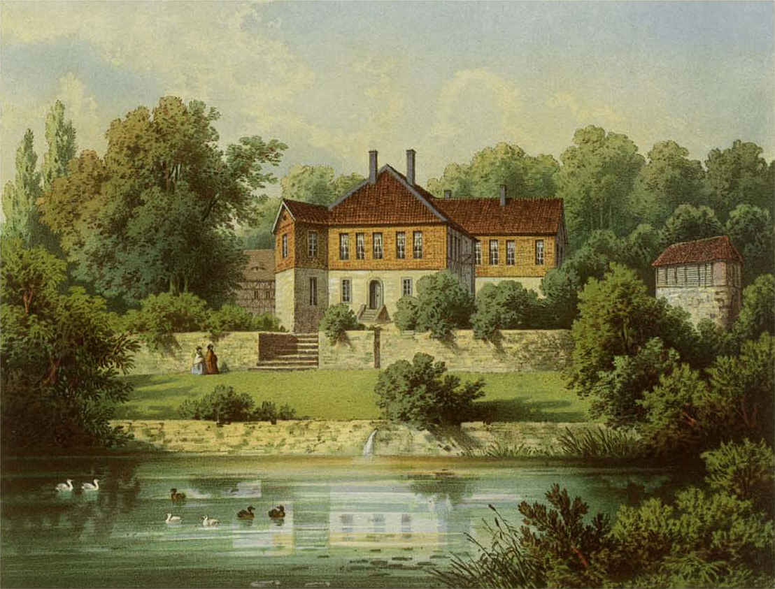 Gutshaus Adelsborn, Kreis Worbis